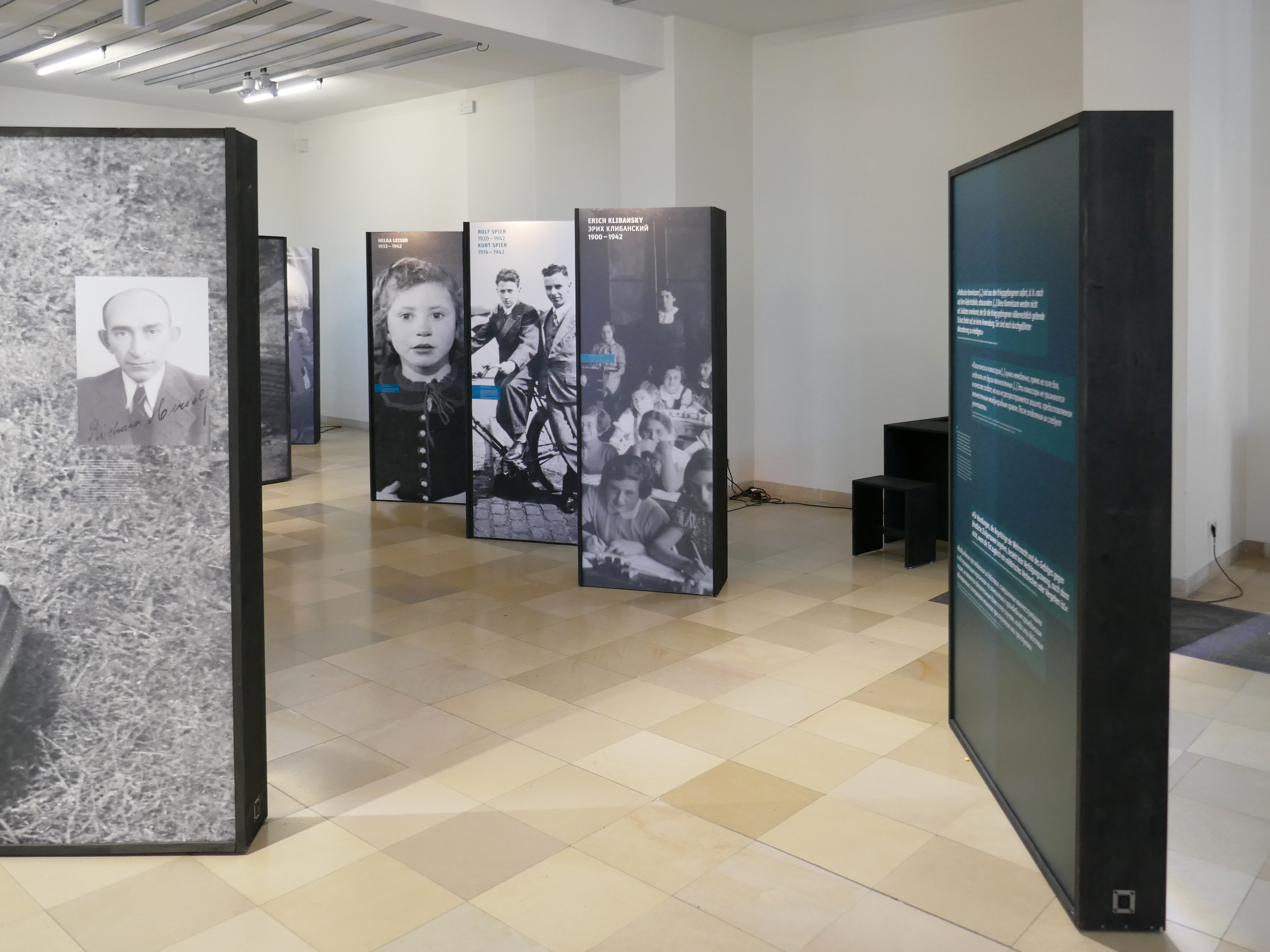 NS-Dokumentationszentrum der Stadt Köln, Sonderausstellung im EL-DE-Haus: "Vernichtungsort Malyj Trostenez".